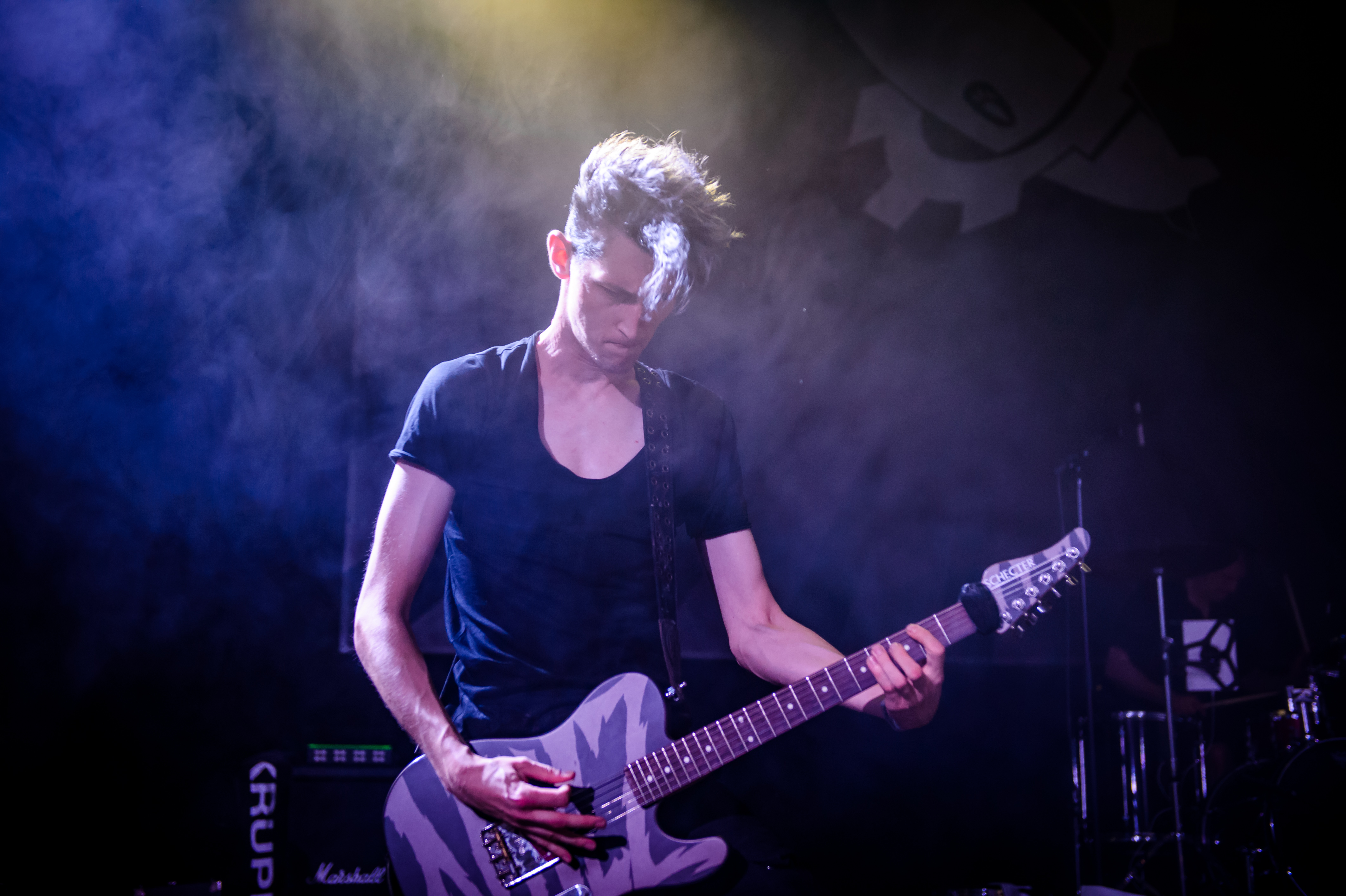 'Amphi Festival 2017; Tanzbrunnen Köln': 'Die Krupps'